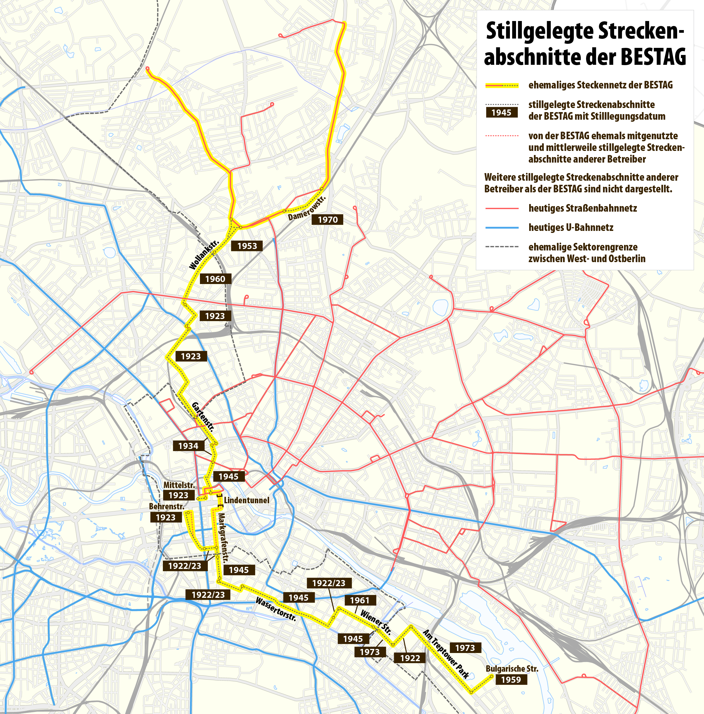 Karte der Stilllegungen im Streckennetz der BESTAG